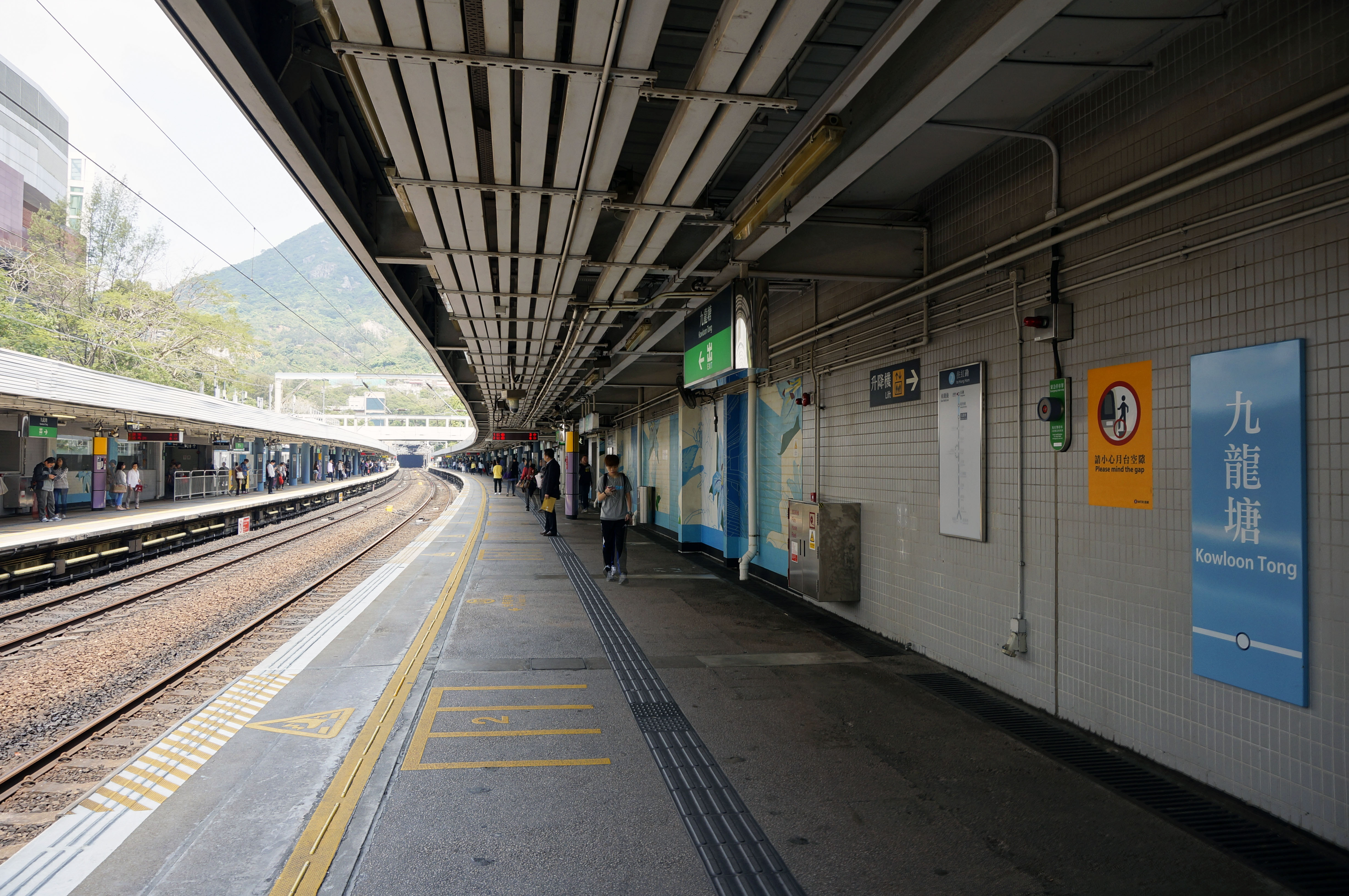 港鐵九龍塘站月台